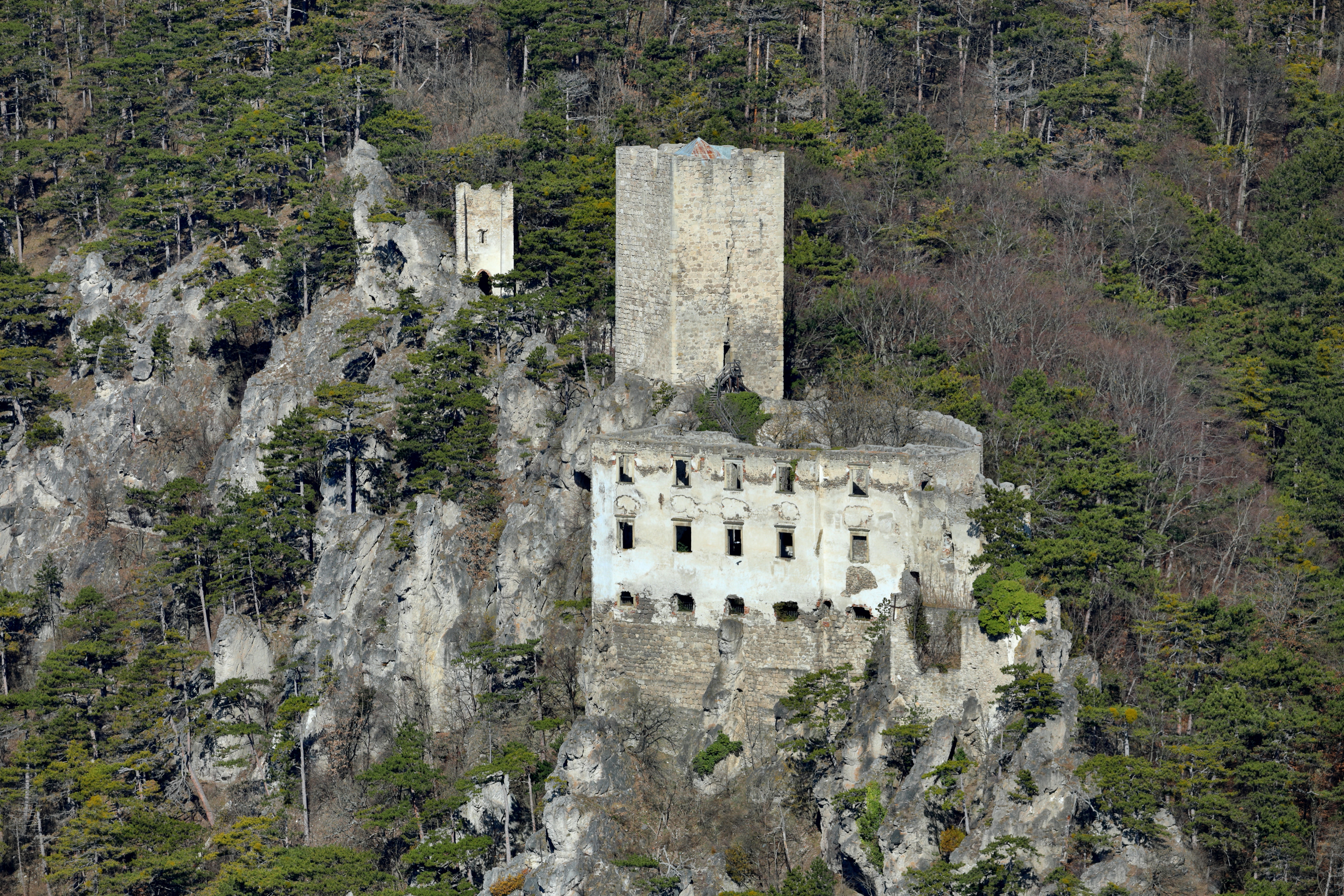 Blick von der Burgruine Rauheneck auf die Burgruine Rauhenstein in der niederösterreichischen Stadtgemeinde Baden.